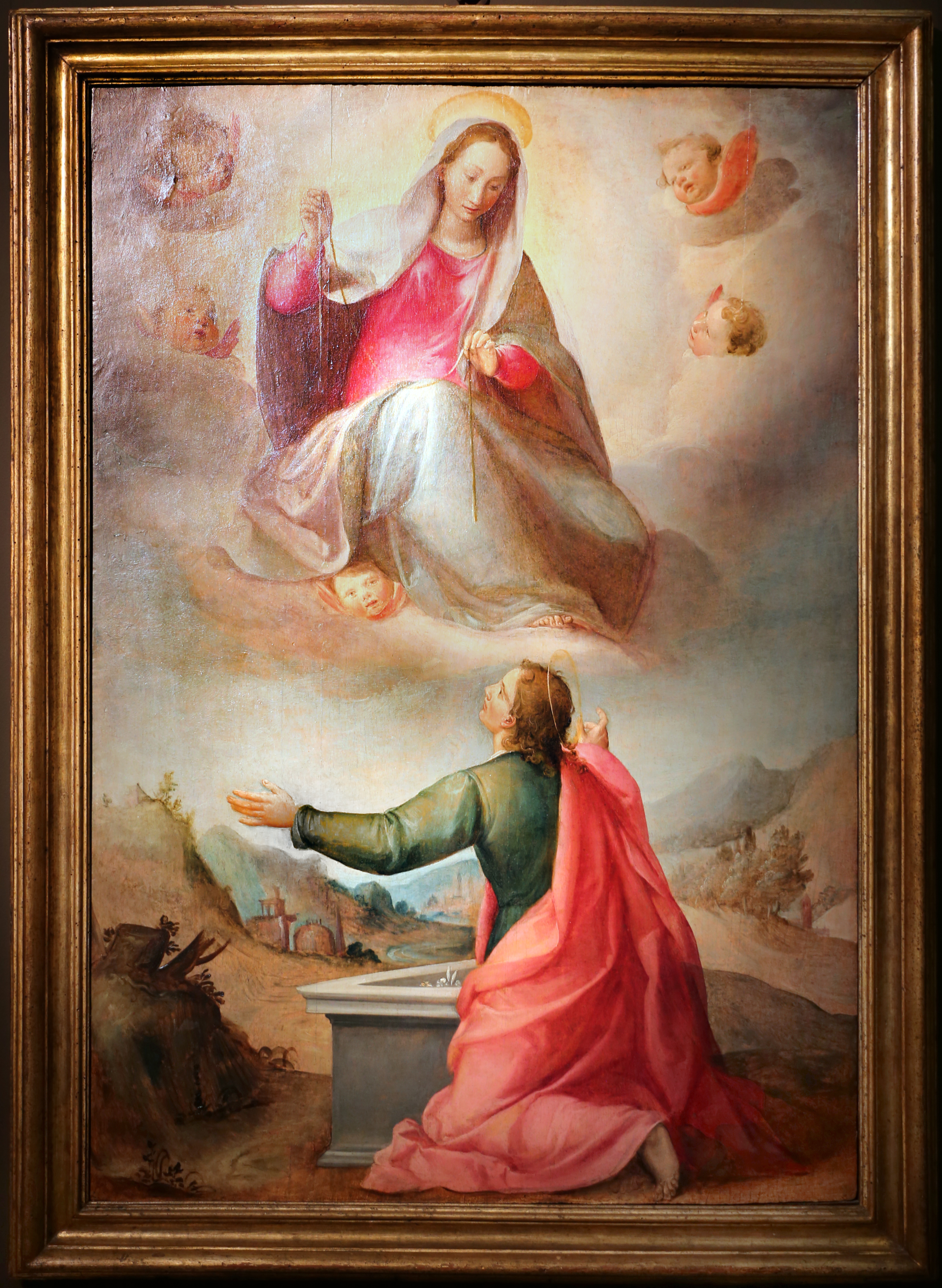 Museo civico (Prato) This is a photo of a monument which is part of cultural heritage of Italy.